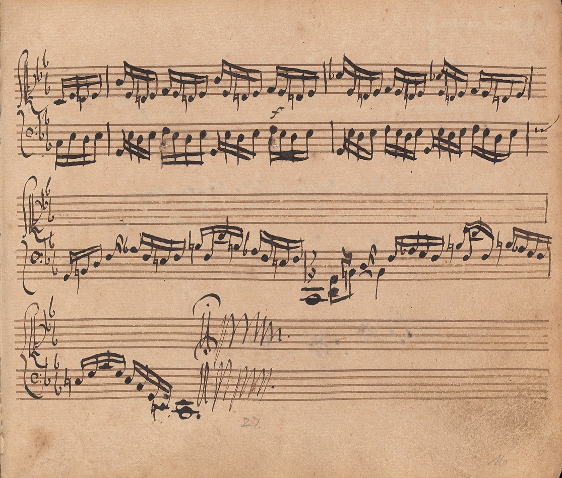 Les dernières mesures du Prélude (BWV 847) tel qu'il se présente dans le Clavierbüchlein pour Wilhelm Friedemann Bach (1720) no. 15.